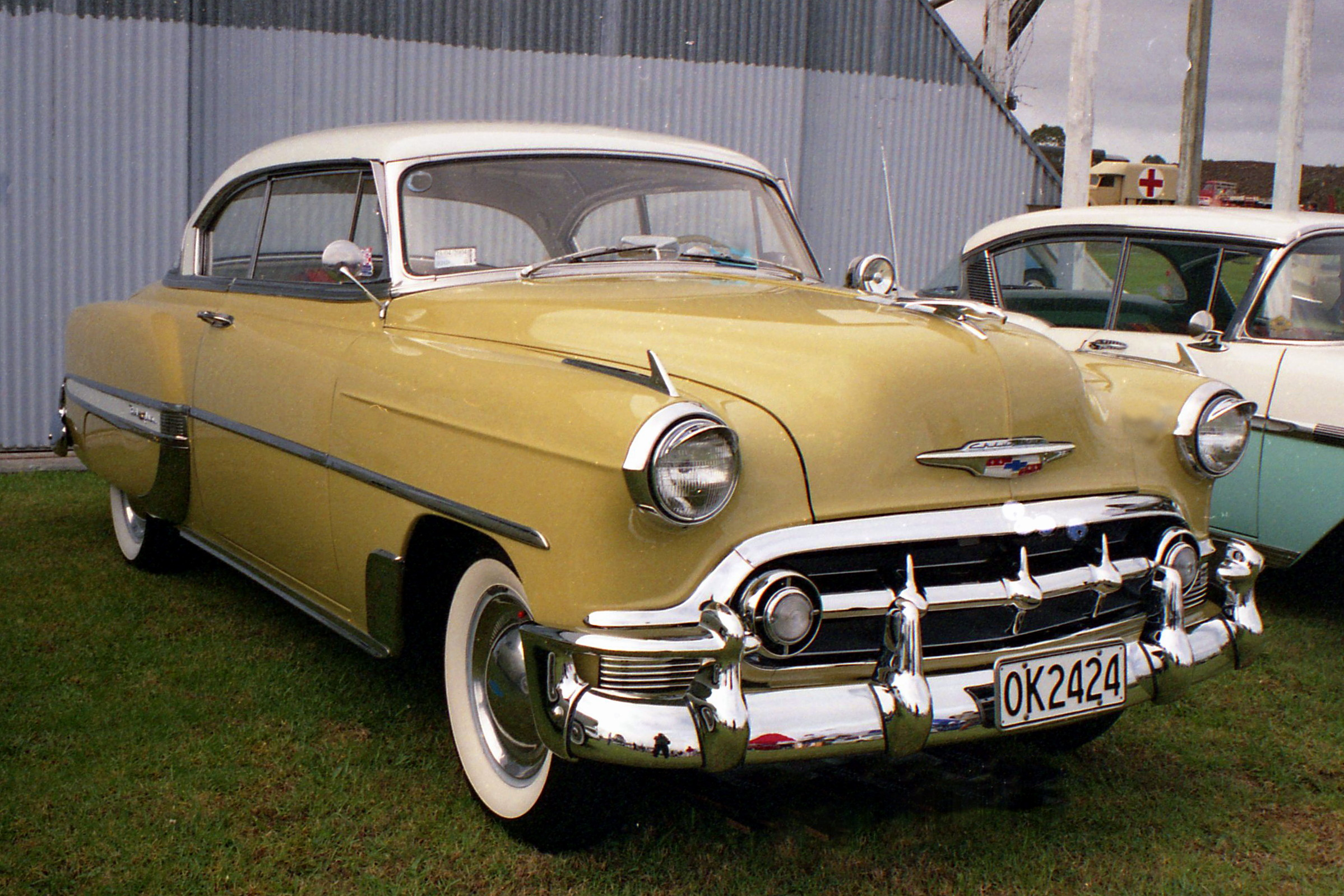 Western Springs,Auckland.New Zealand